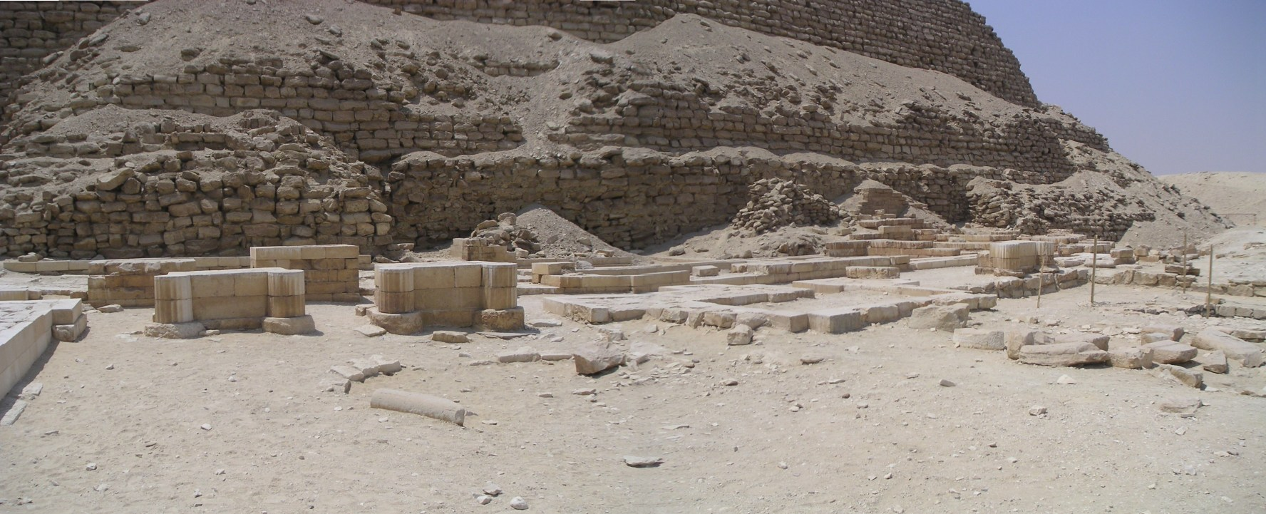 Ruines du temple funéraire de Djéser situé contre la face nord de sa pyramide à Saqqarah - IIIe dynastie égyptienne